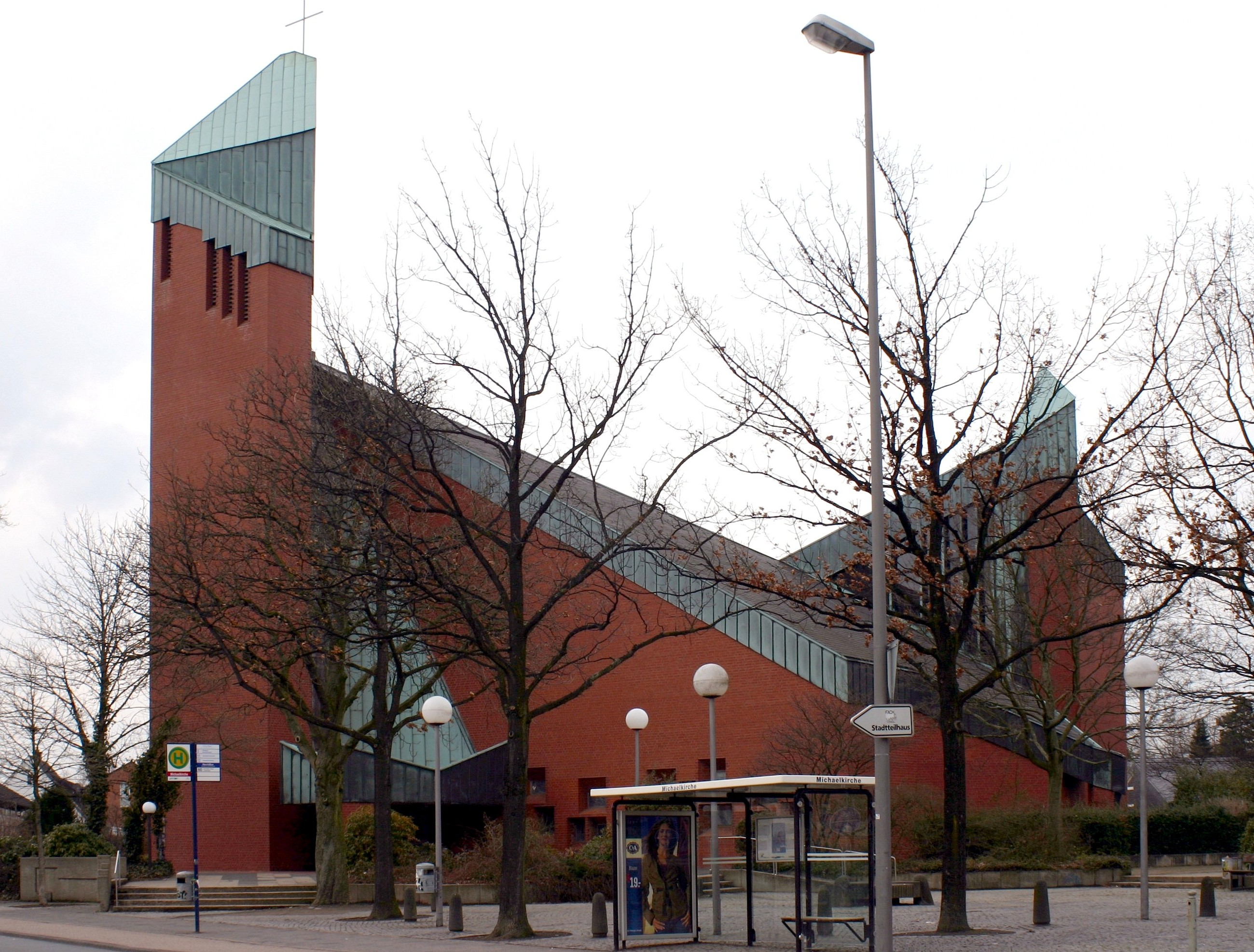 Münster Gievenbeck, Michaelkriche